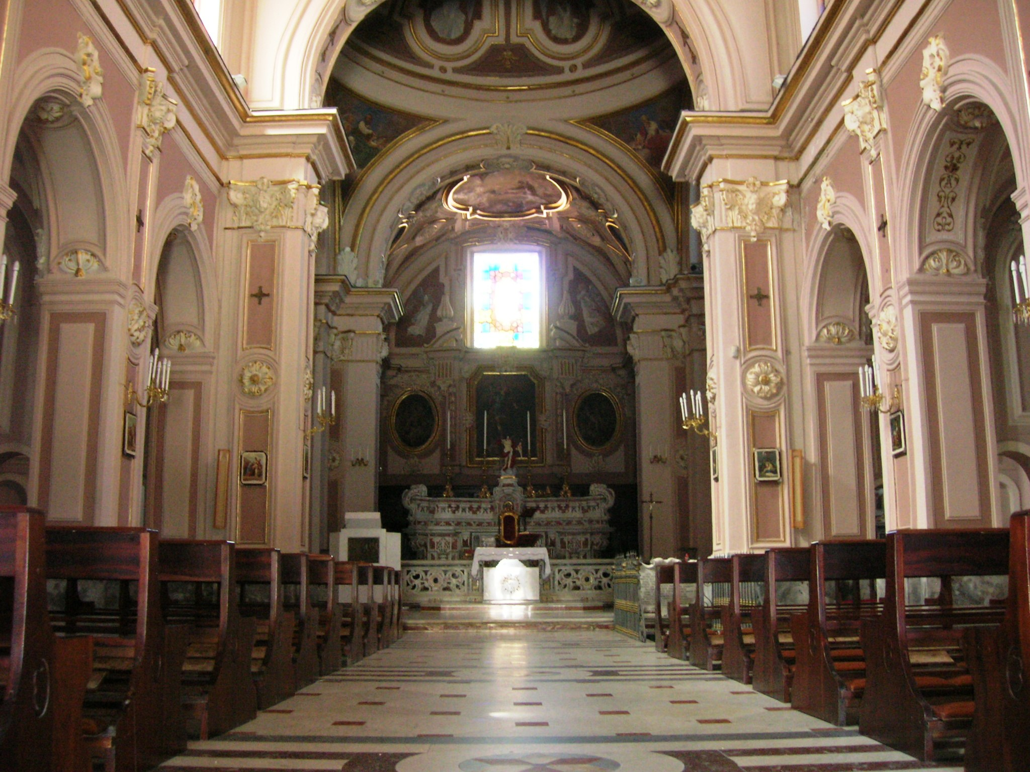 Santuario di Santa Maria di Pozzano a Castellammare di Stabia